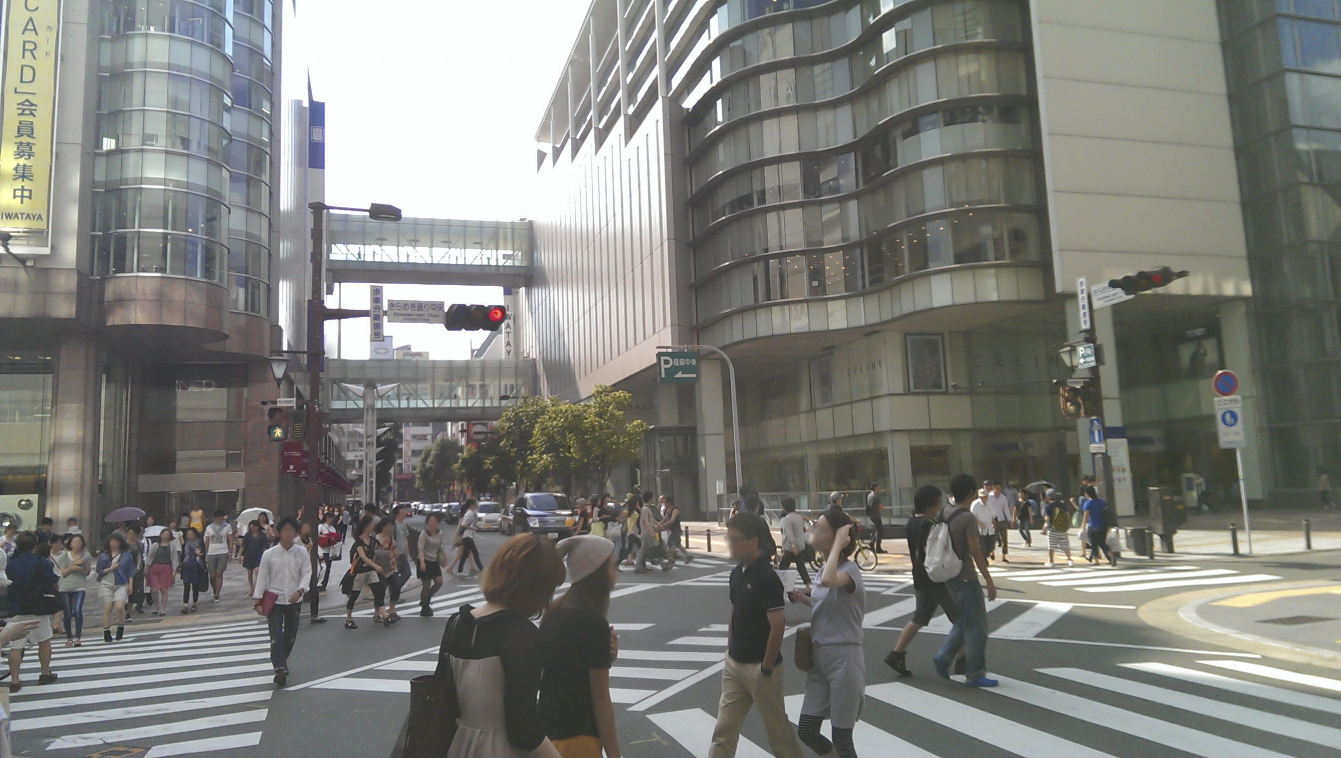 福岡市天神にある「きらめき通り」の交差点